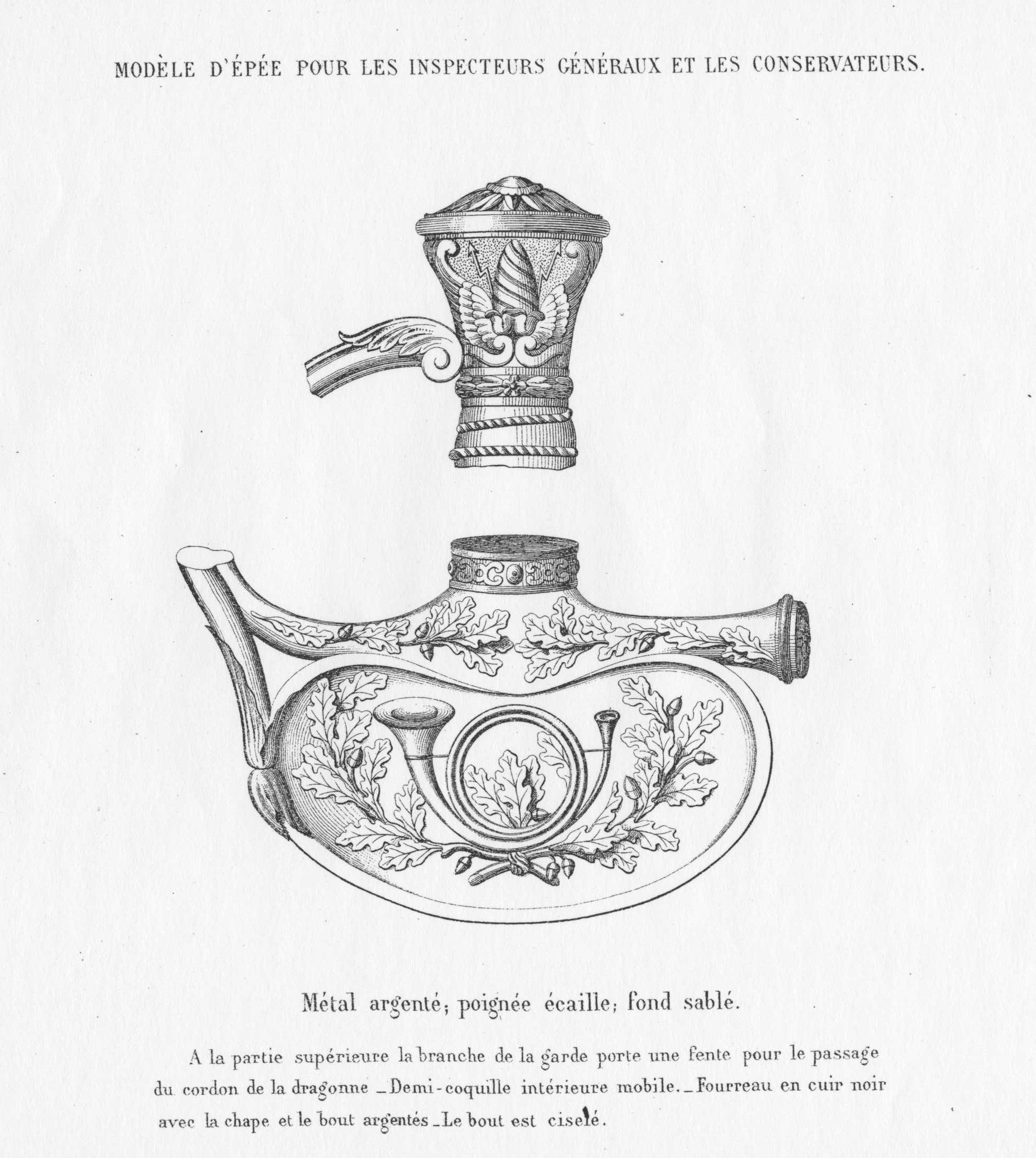 Épée des officiers généraux (inspecteurs généraux, administrateurs, directeur) de l'Administration des Forêts, 1878, reprise par l'arrêté de 1891.